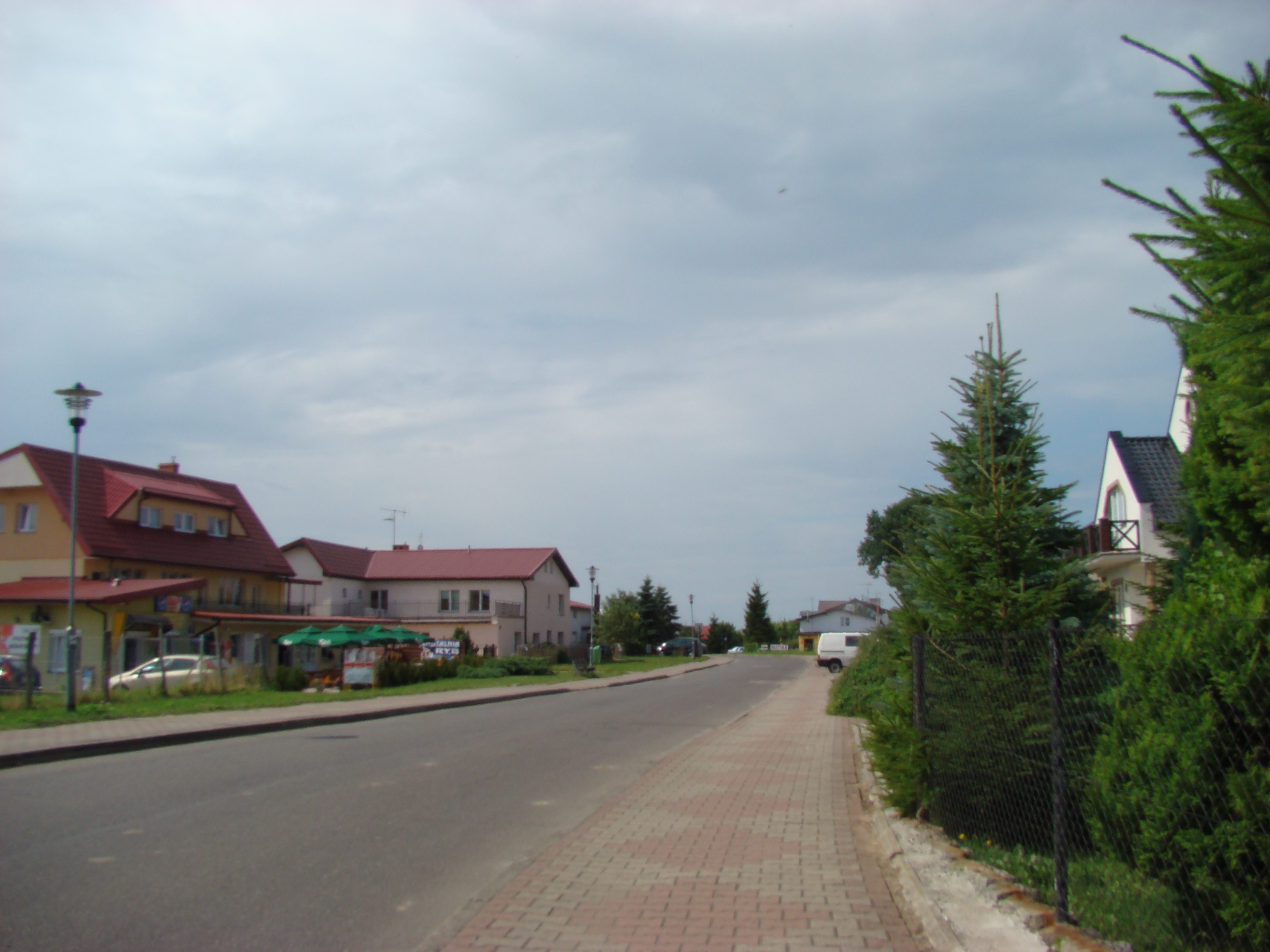 Sianożęty